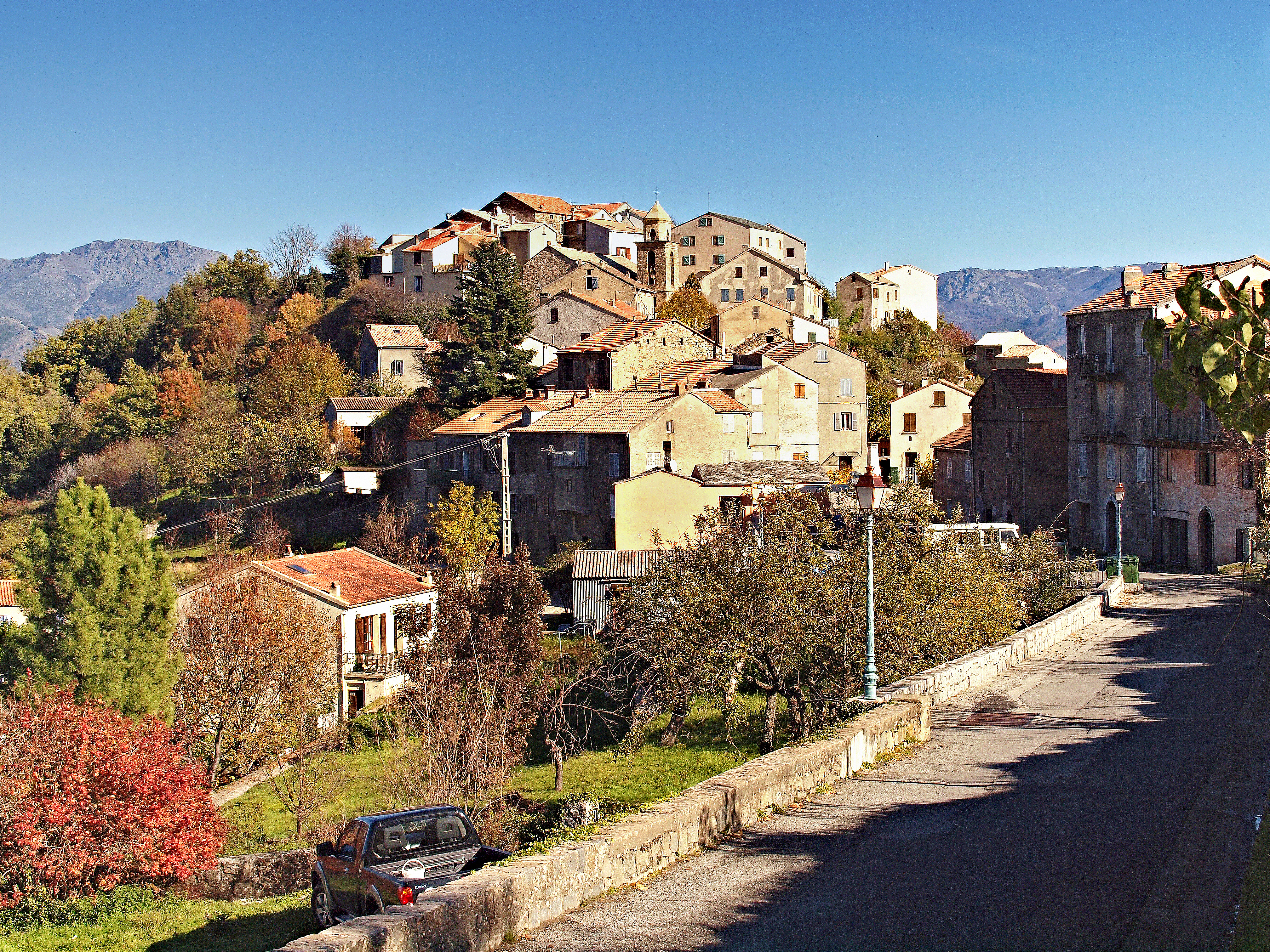 Riventosa - Le village